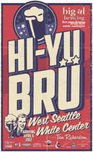 An example of modern usage of Chinook Jargon.